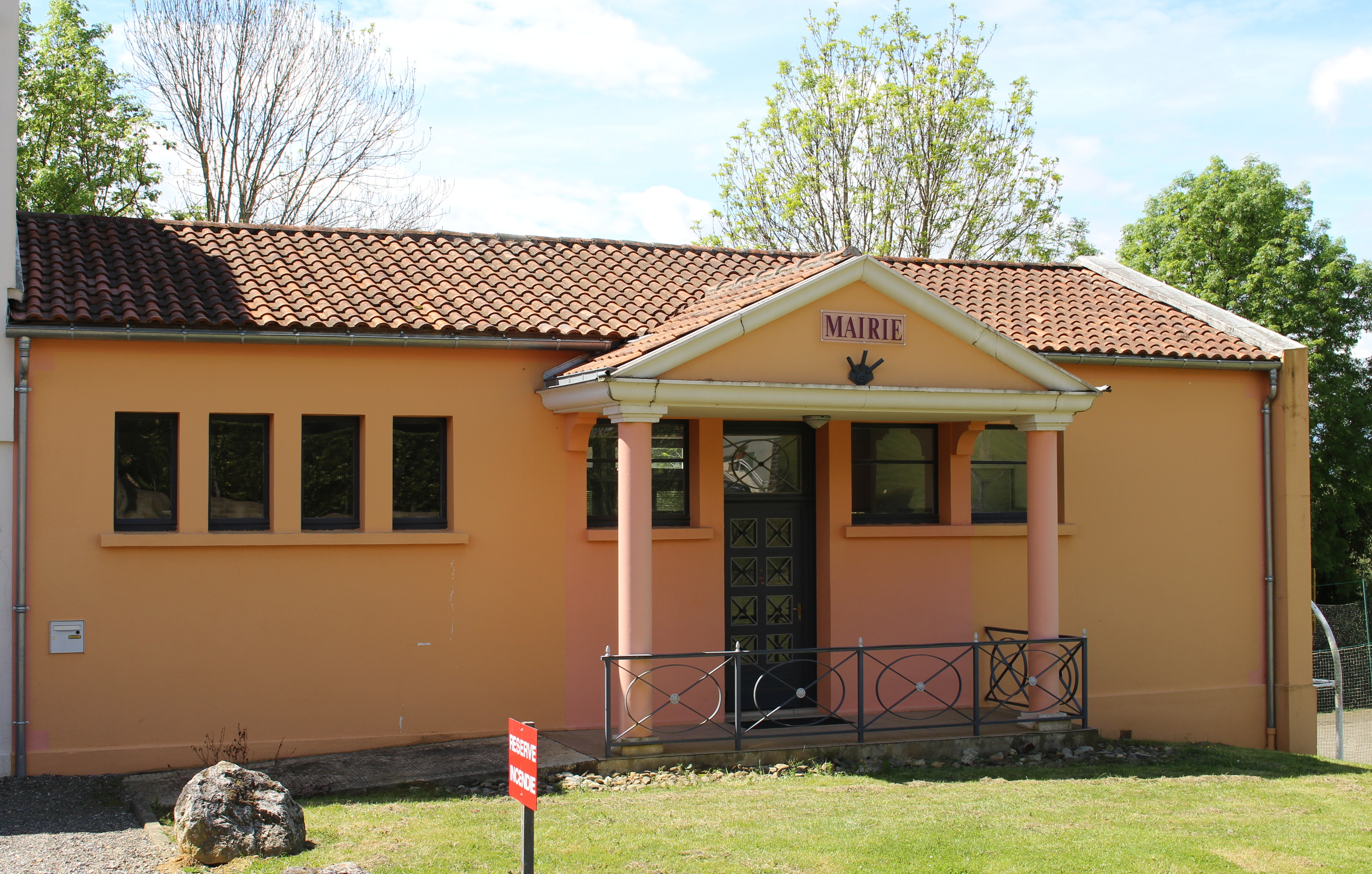 Mairie de Barbazan-Dessus (Hautes-Pyrénées)